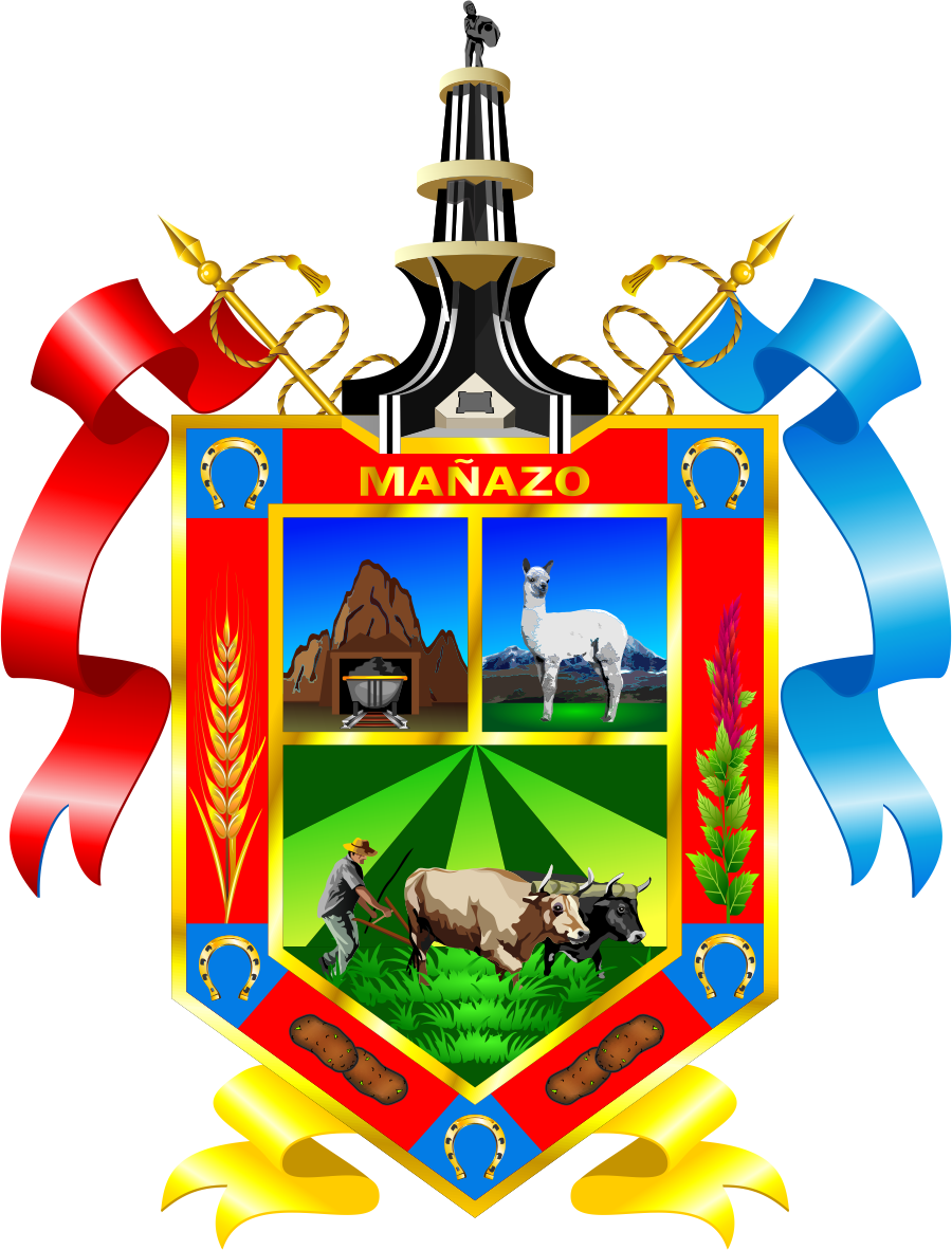 Distrito de Mañazo - Provincia de Puno - Región Puno